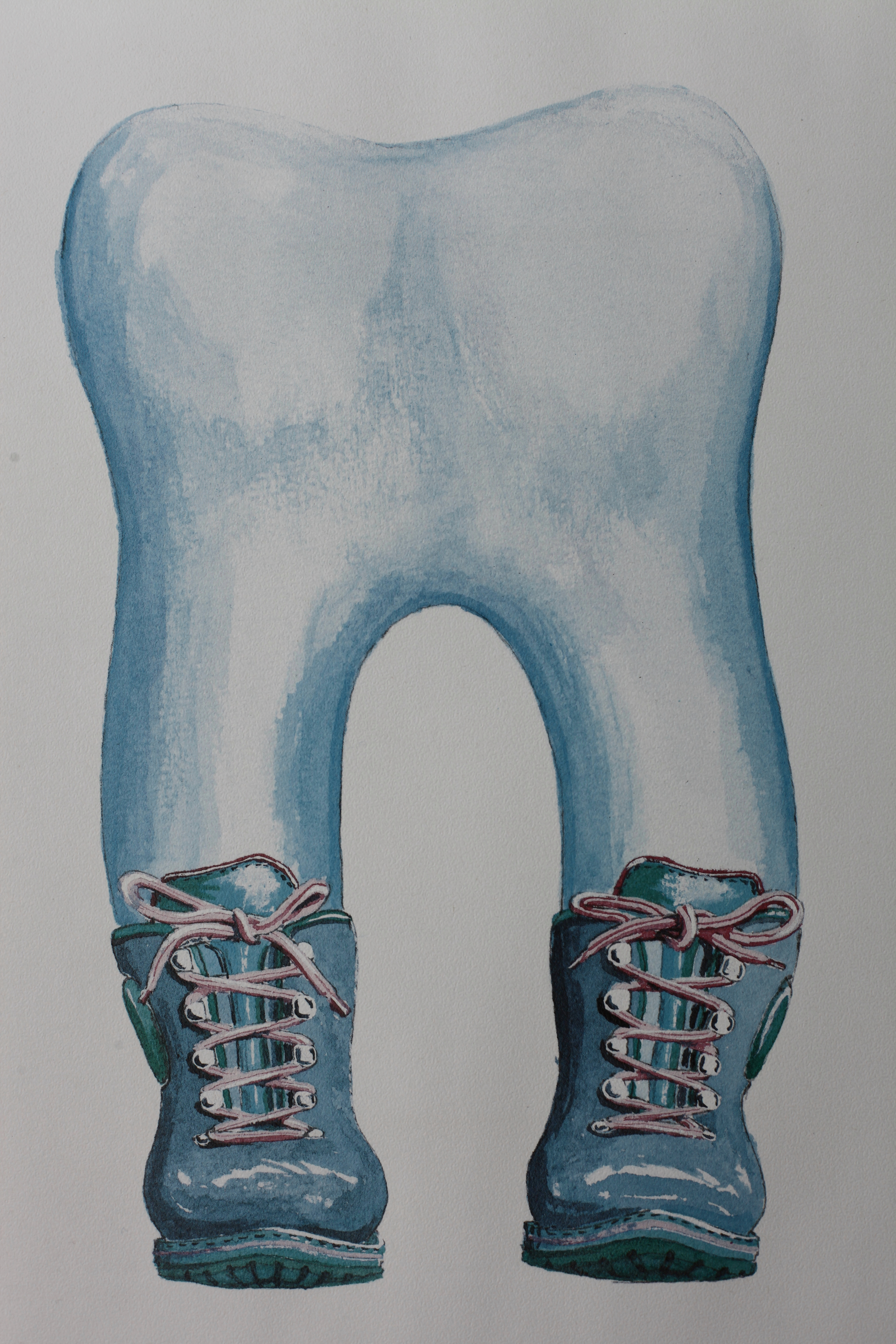 Zahnwanderung